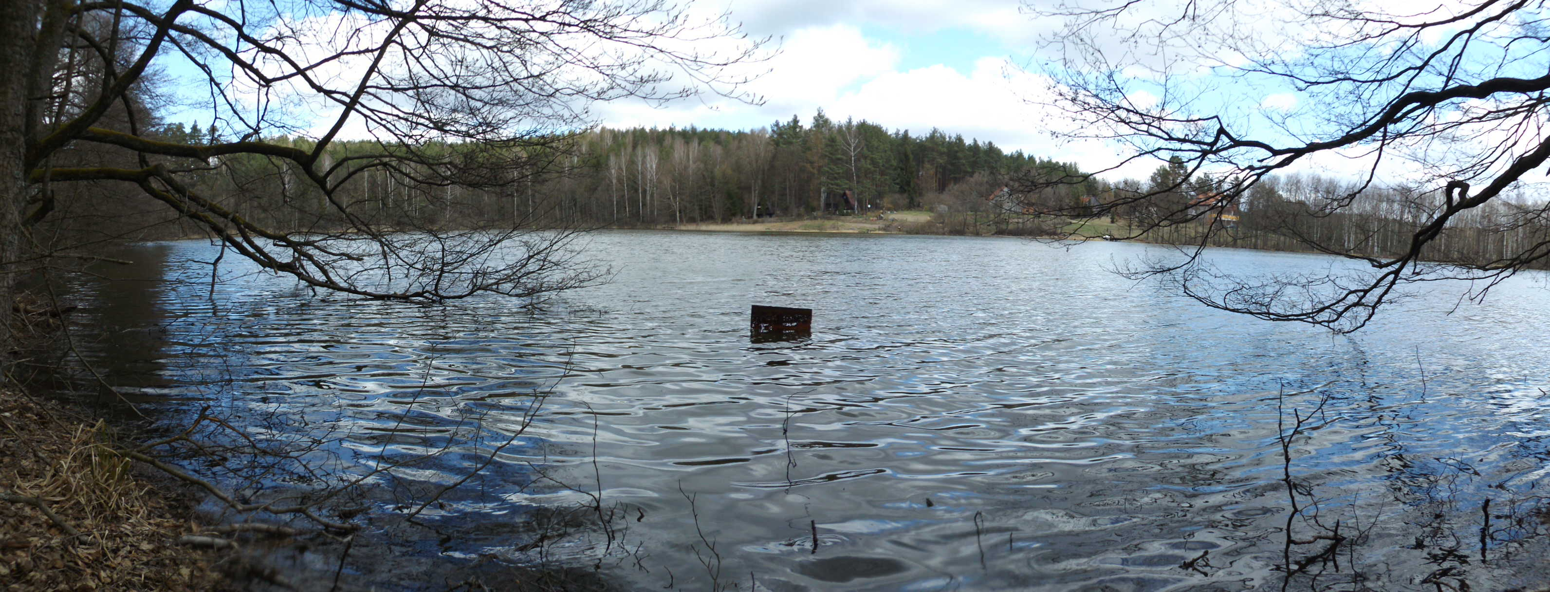 Jezioro Kalwka k. wsi Krzywonoga, kierunek północny